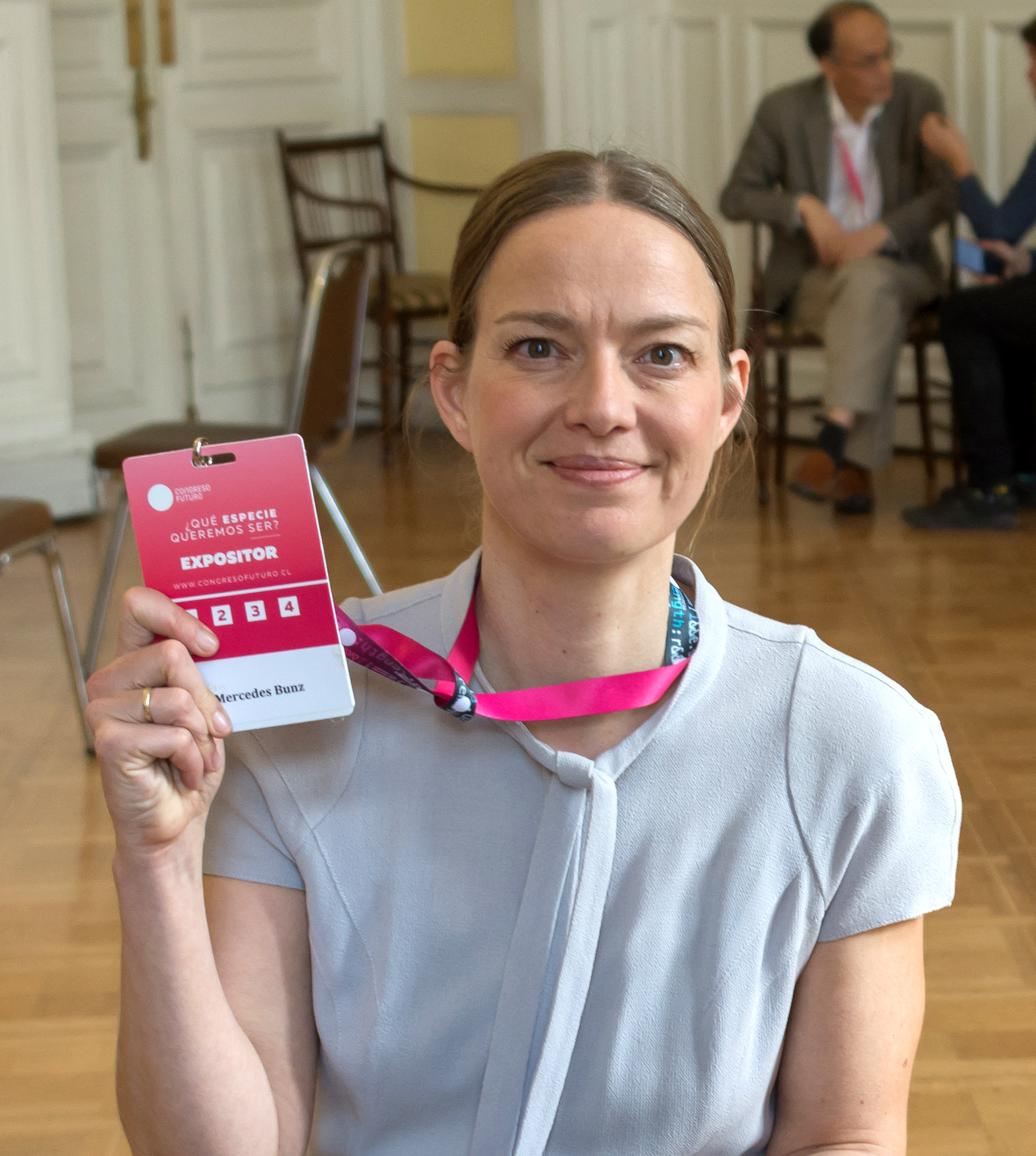 Mercedes Bunz, Congreso Futuro, Ex Congreso Nacional, Santiago, Región Metropolitana, Chile.